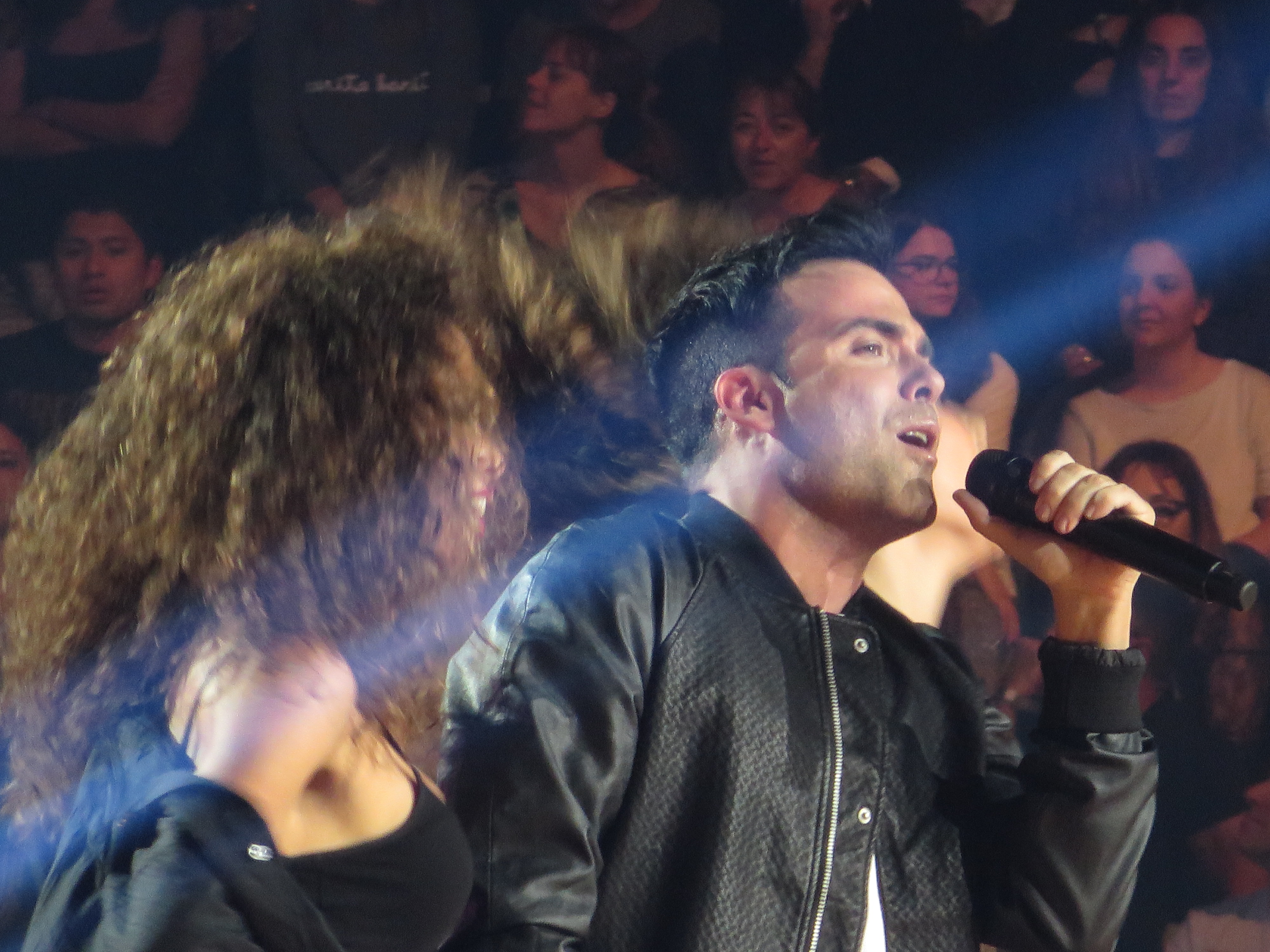 Actuación de Naim Thomas en el concierto conmemorativo del 15 aniversario de OT en el Palau Sant Jordi de Barcelona (31-10-2016)